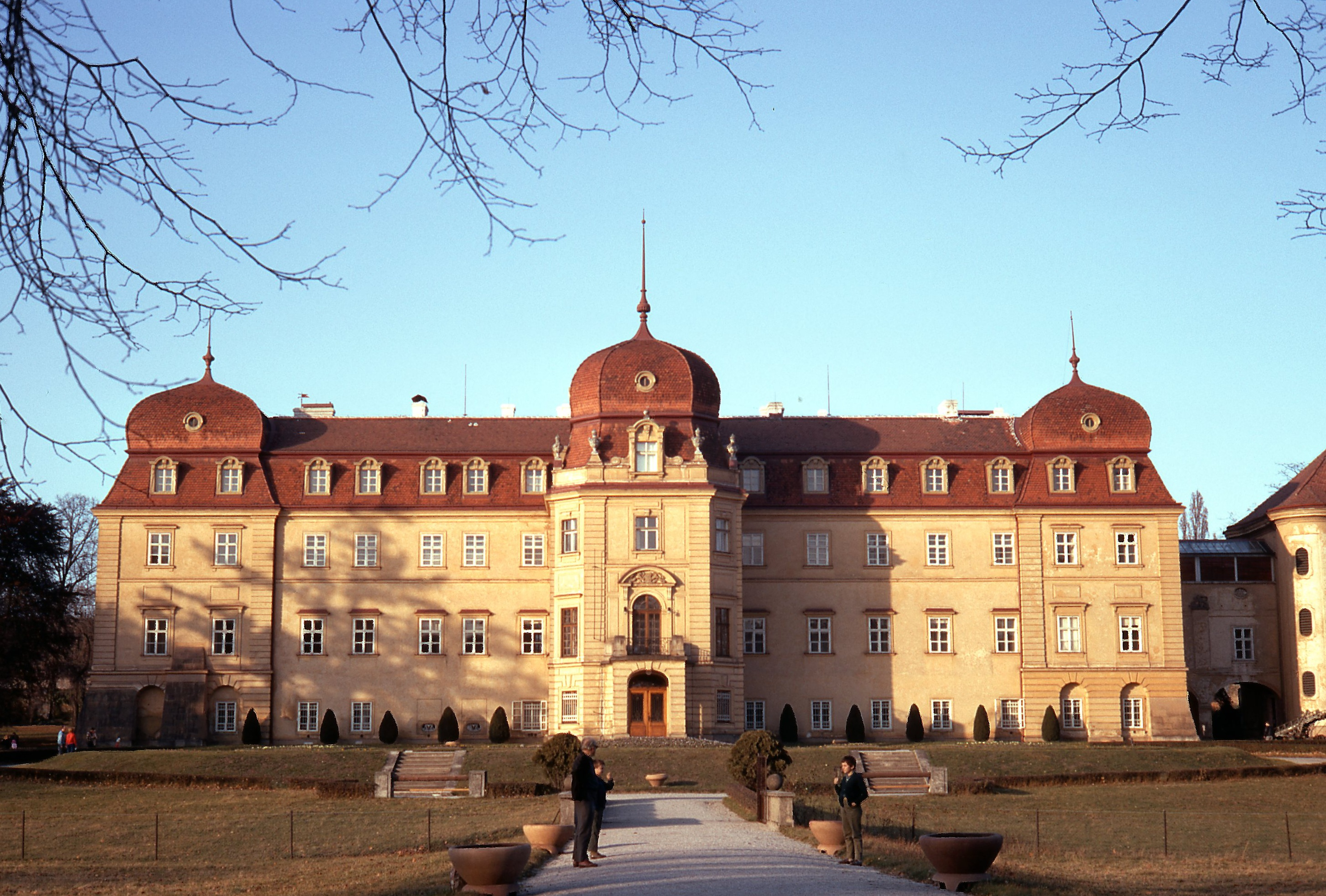 Zámek v Lánech, někdy v 70. letech, Schloss Lány ehemals Eigentum der Adelsfamilie Fürstenberg, heute Sommersitz des Staatspräsidenten von Tschechien